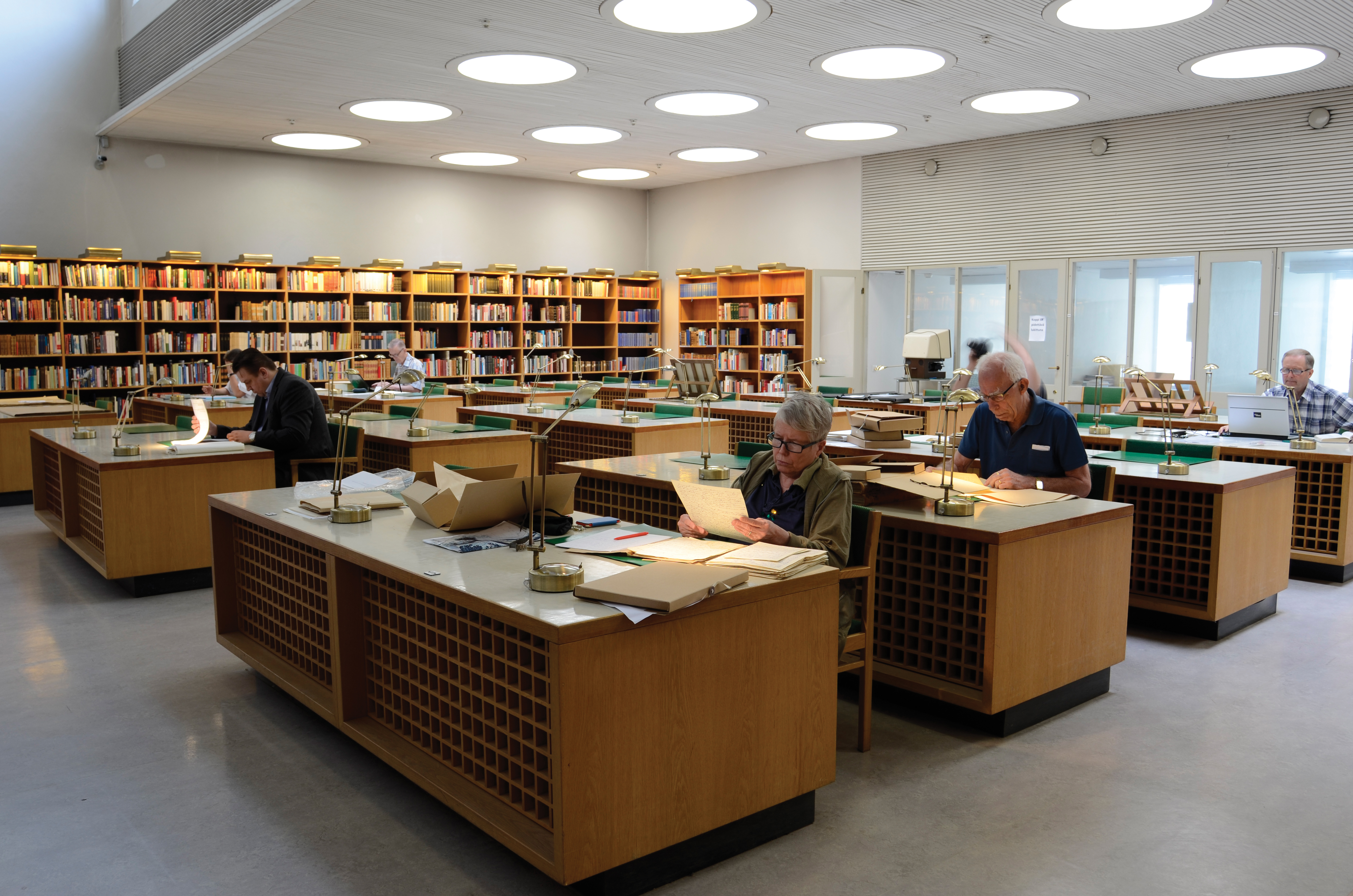 Читальный зал в главном здании Национального архива Финляндии, фото сделано в читальном зале, при нормальных обстоятельствах